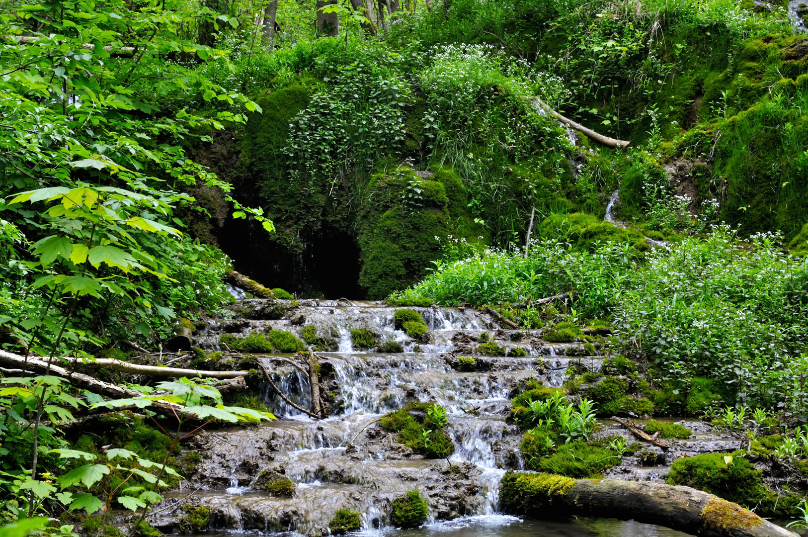 Wanfried-Elfengrund Wasserfall im Mai 2012